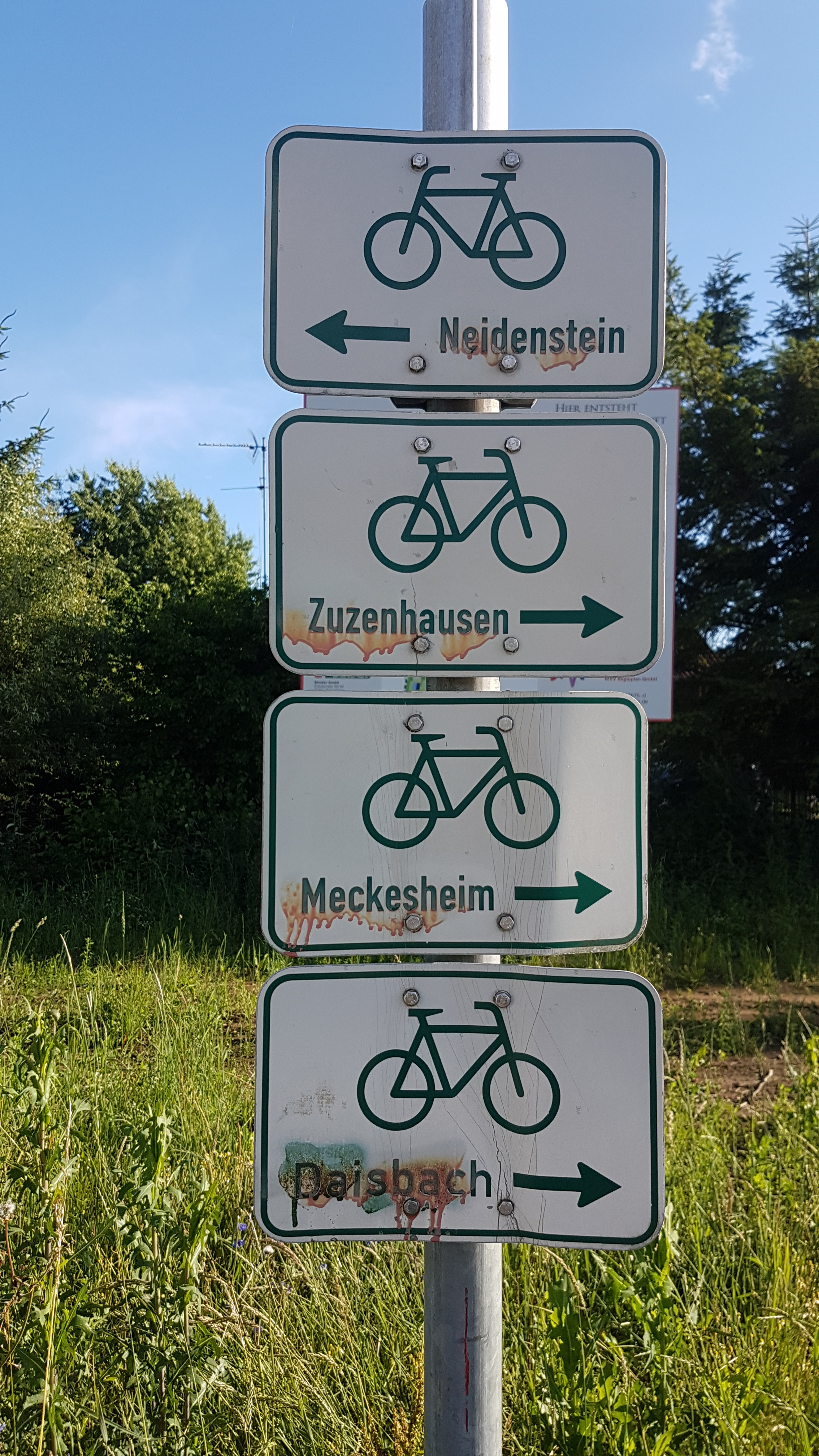 Radwegebeschilderung in Eschelbronn